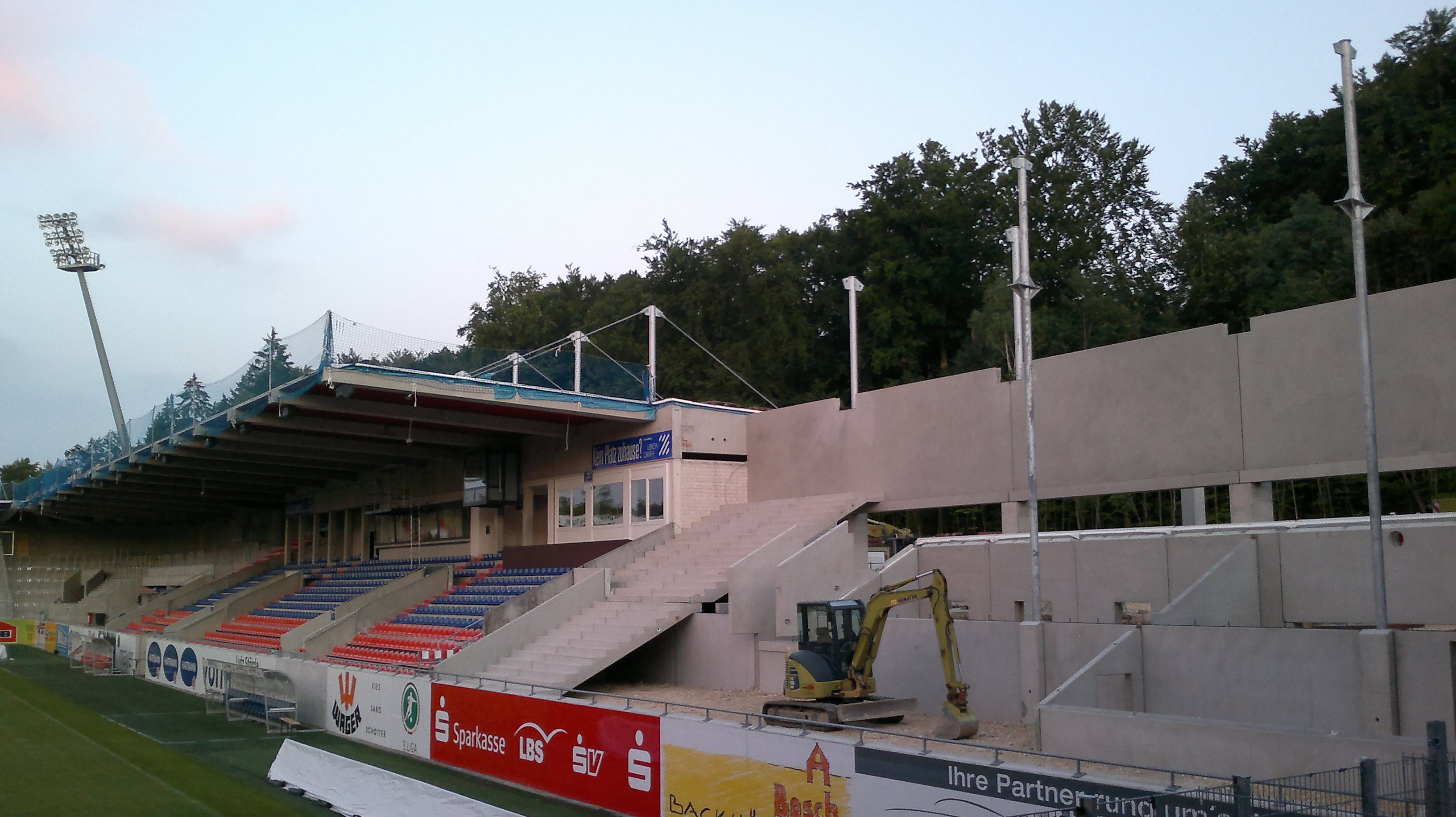 Erweiterung der Südtribüne der Voith-Arena, Heidenheim.